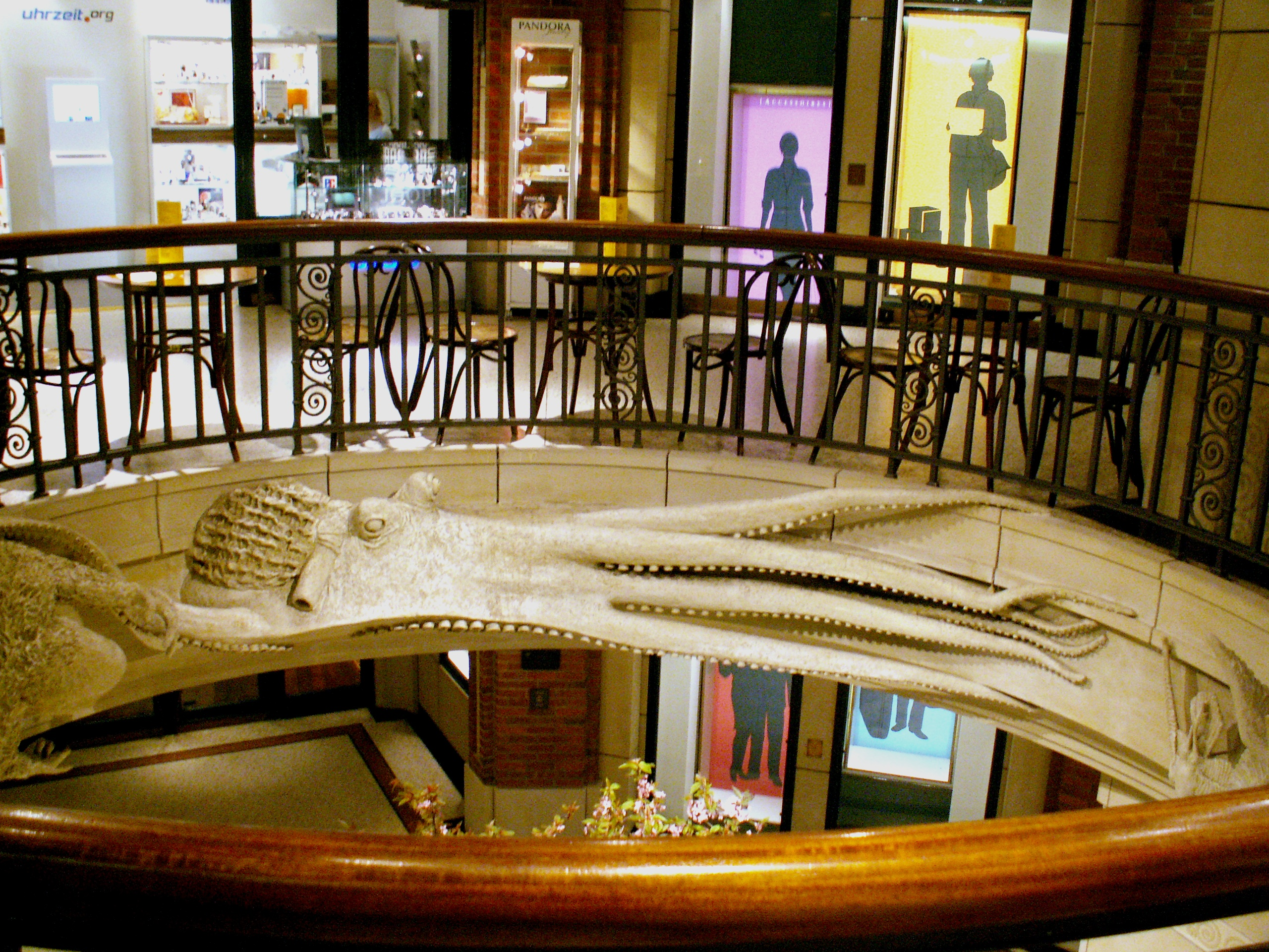 Mittelbereich der Einkaufspassage im Levantehaus in Hamburg, Deutschland, im Hintergrund die Installation an der Stelle des ehemaligen Paternosters. The middle of the shopping mall Levantehaus in Hamburg, Germany, where an artwork took the place of the old paternoster.